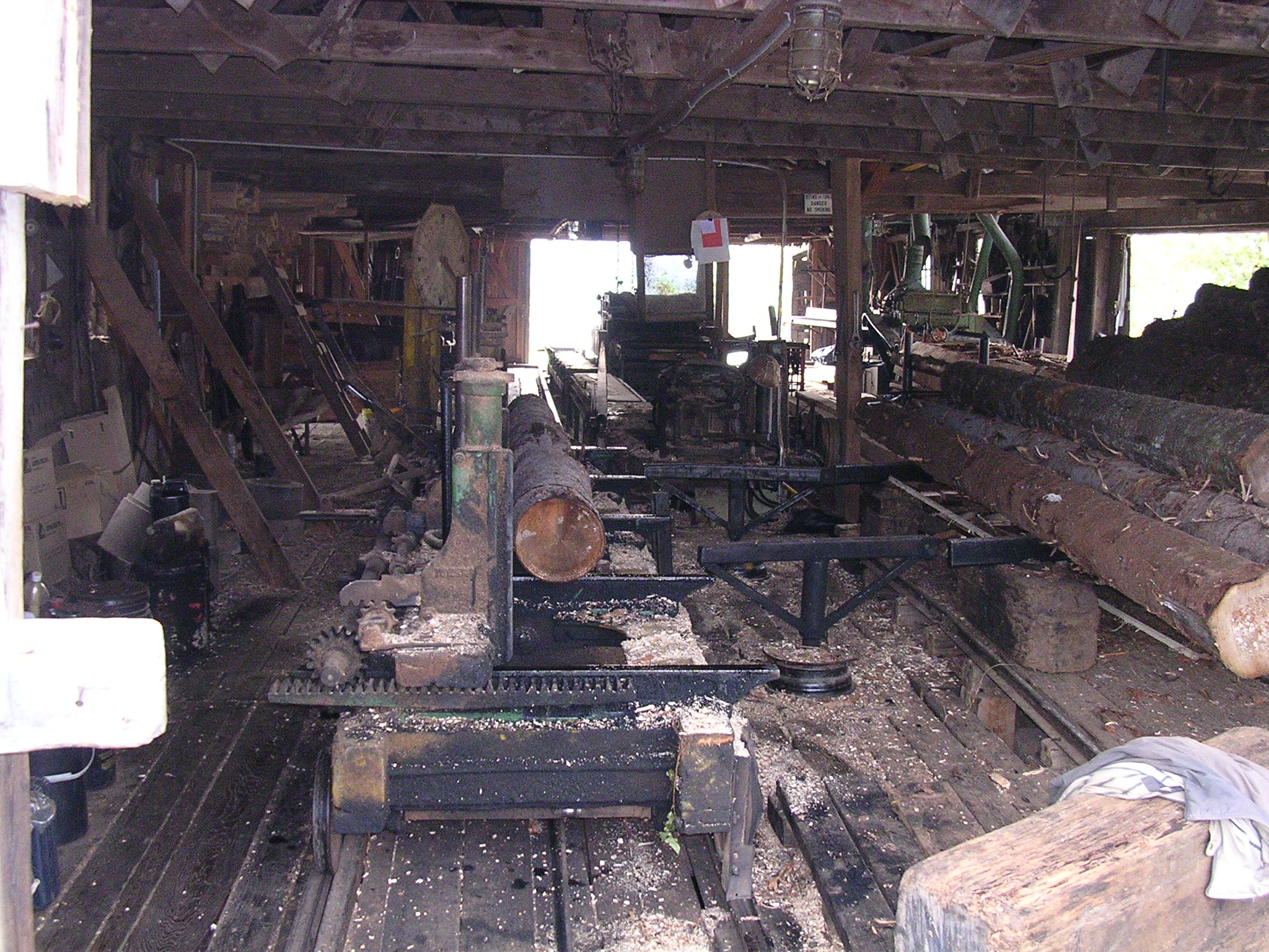 Moulin Goulet, situé sur la rivière des Envies à Saint-Stanislas (Mauricie, Québec). Moulin à eau; moulin à farine; meunerie; moulin à scie.